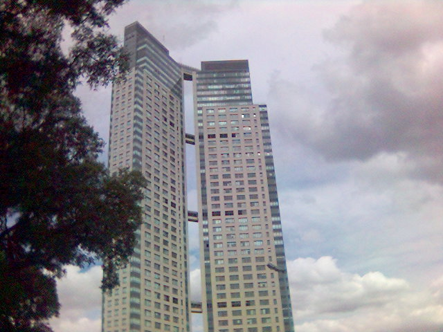 Torres El Faro